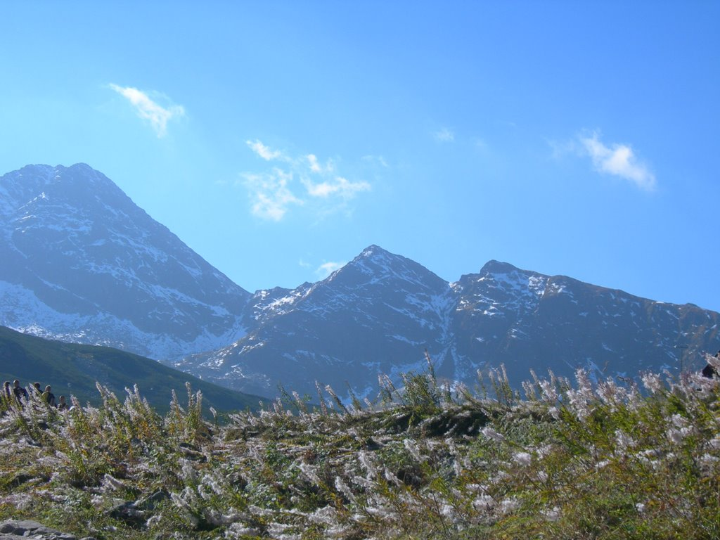 Świnica, Pośrednia i Skrajna Turnia z drogi na Kasprowy Wierch